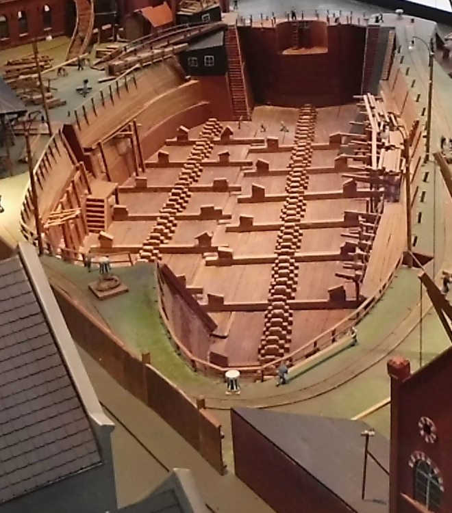 Blick auf das Bremerhavener Doppeldock im Modell der Wenckewerft im Historischen Museum Bremerhaven. Historisches Museum Bremerhaven Native nameHistorisches Museum BremerhavenLocationBremerhaven, GermanyCoordinates53° 32′ 20″ N, 8° 35′ 08″ E Established1991WebsiteHomepageAuthority control VIAF: 138282000 LCCN: n2003100099 GND: 16054638-2 SUDOC: 112852483 WorldCat